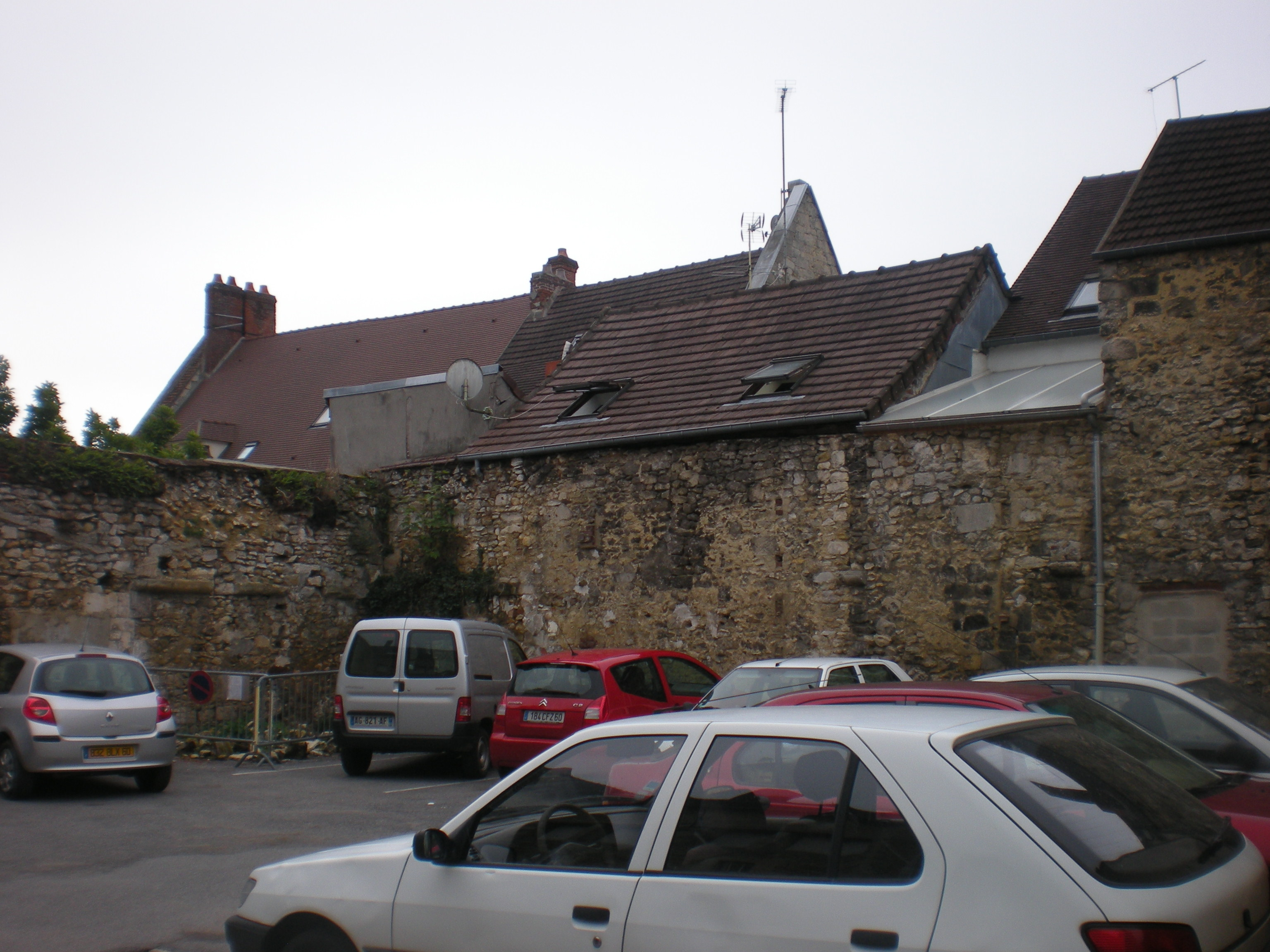 L'emplacement du cloitre, actuel parking